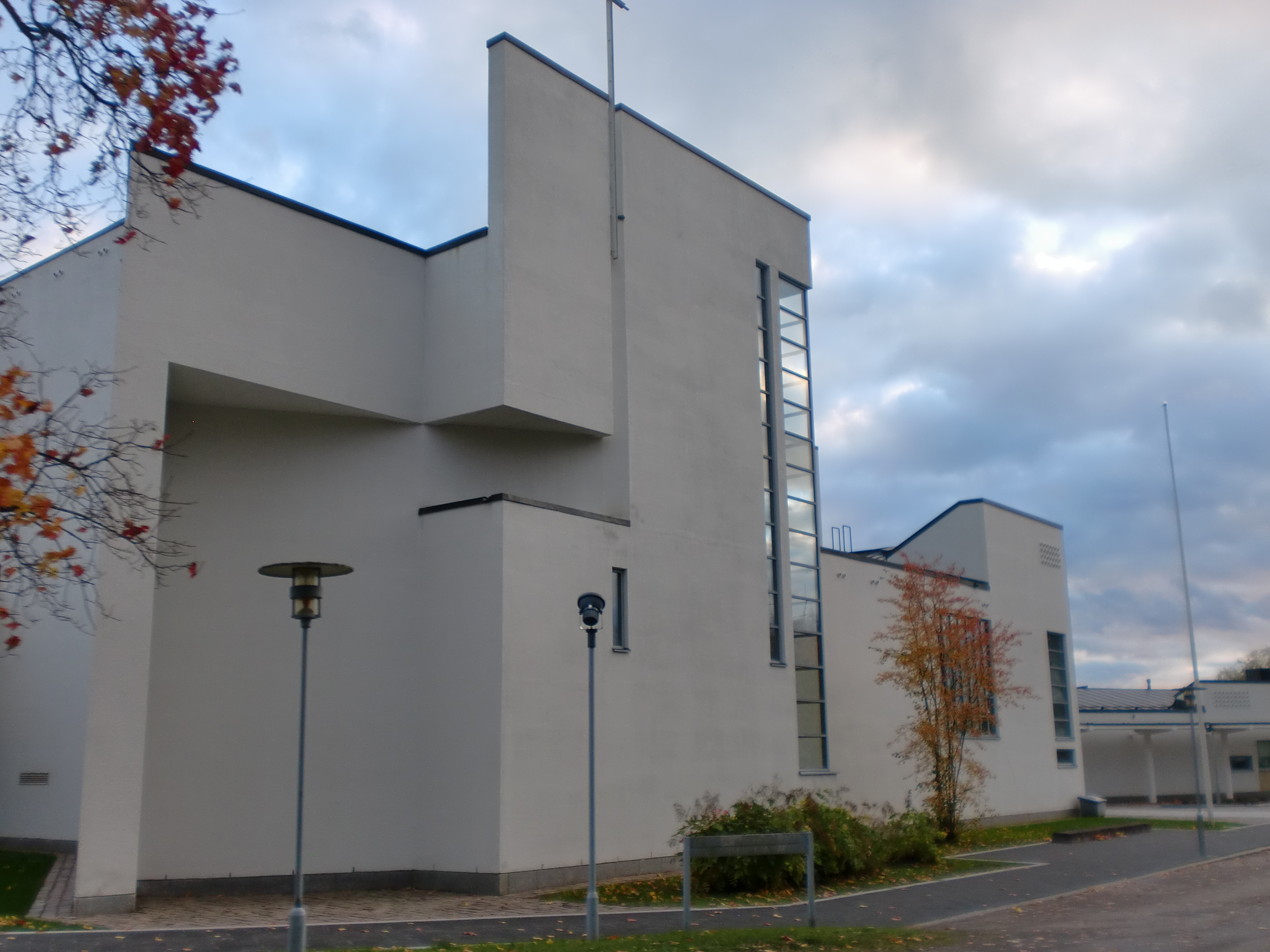 Haapaveden kirkko; church in Haapavesi, Finland